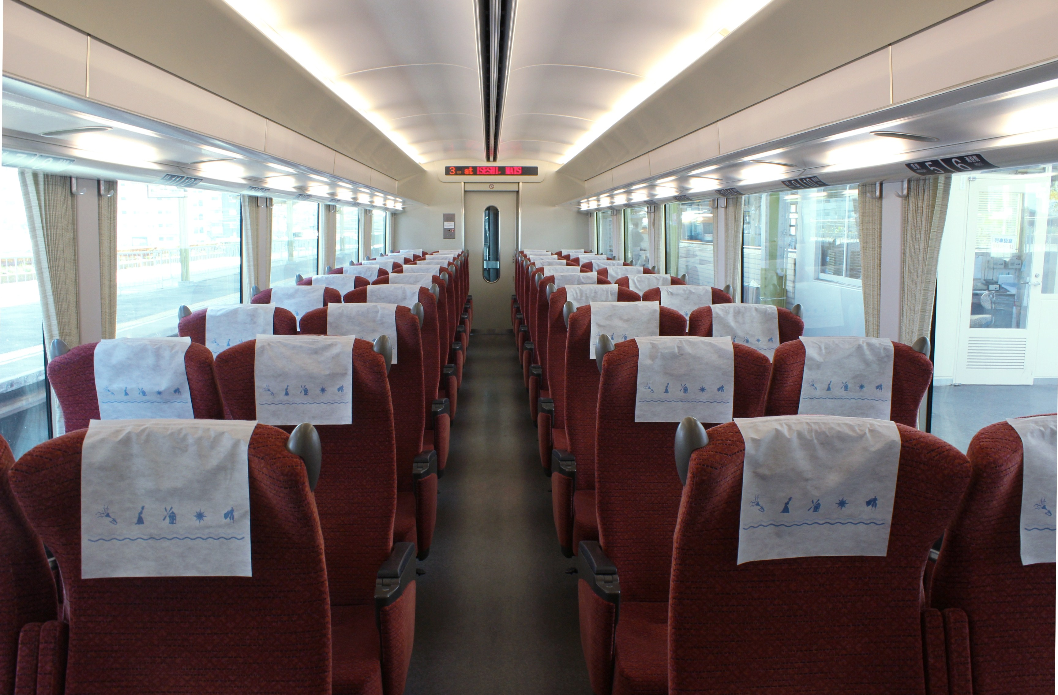 22600系客室